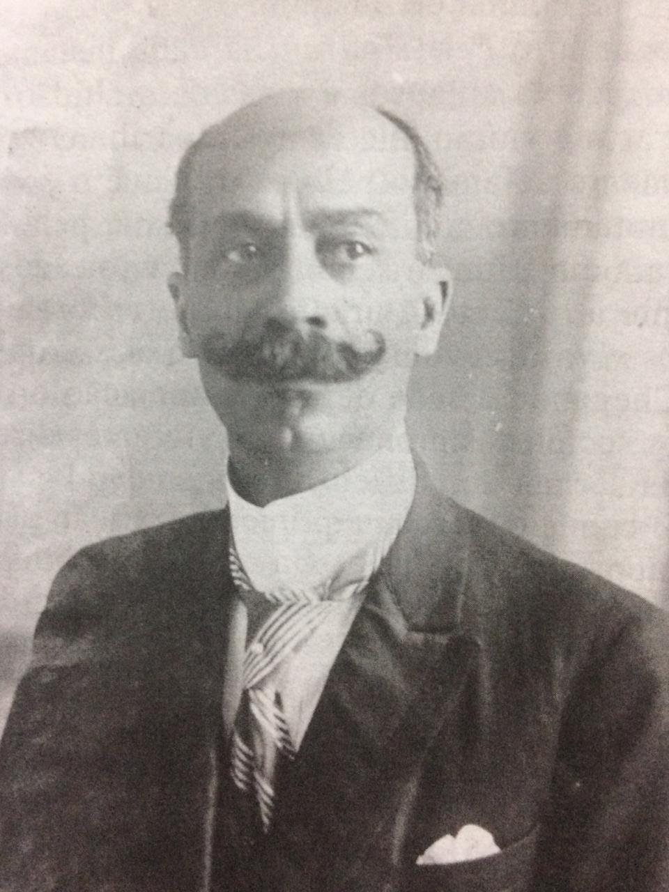 Francisco Xavier da Costa, militante socialista de Porto Alegre e conselheiro municipal pelo PRR a partir de 1912.